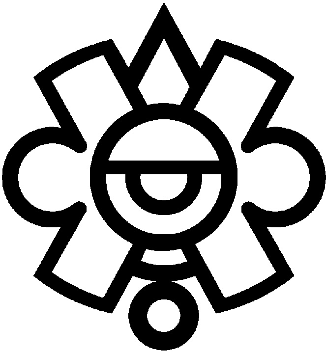 INAH